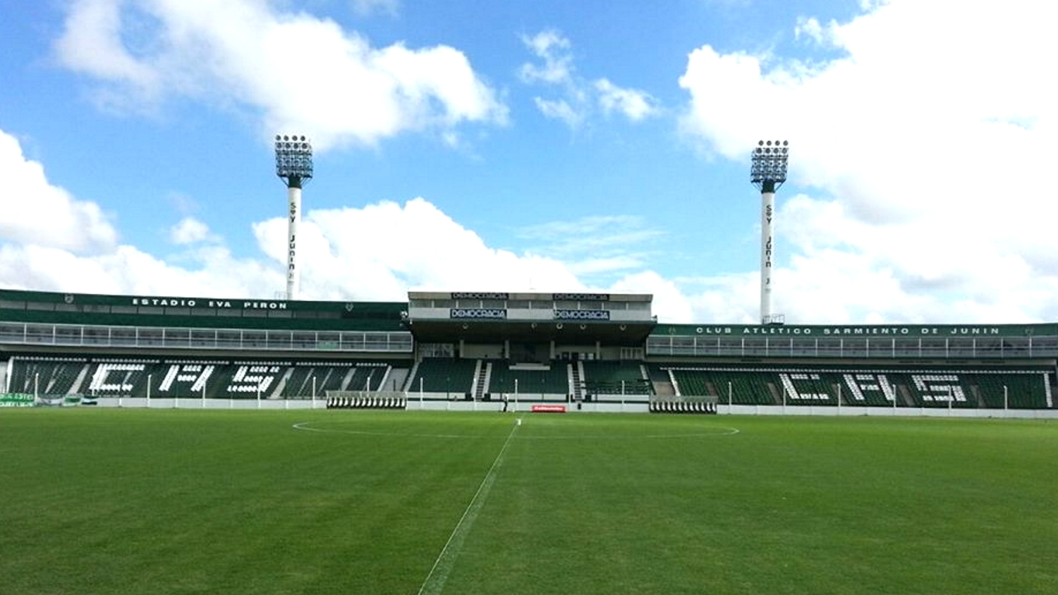 Estadio Eva Perón del Club Atlético Sarmiento. Junín, Argentina. Sector íntegramente de plateas de la calle Necochea. Al centro, platea cubierta; a ambos lados, plateas descubiertas; sobre éstas, los palcos. Sobre los palcos del lado izquierdo, las cabinas de transmisión.